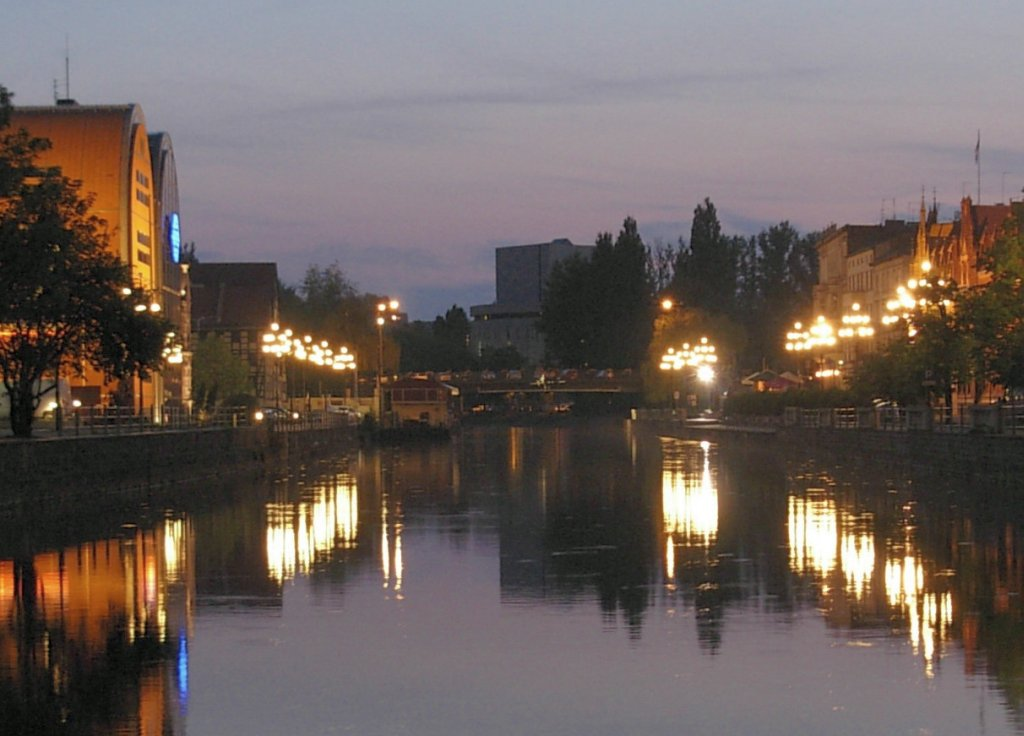 Brda w Bydgoszczy